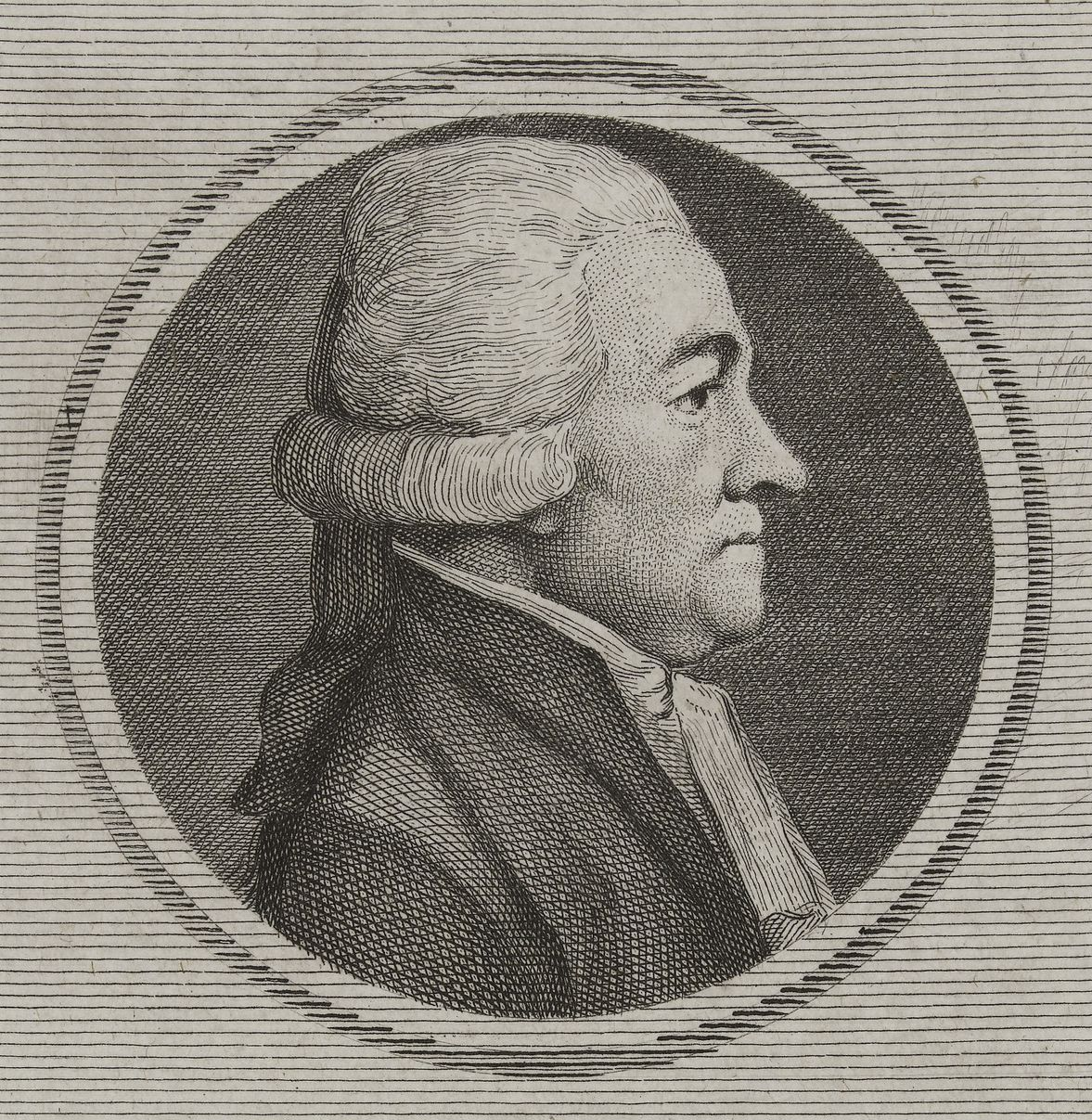 Jean Marie Le Golias de Rosgrand, avocat à Châteaulin, notaire et sénéchal à Brasparts, député du tiers-état aux États généraux pour la sénéchaussée de Carhaix-Huelgoat, maire puis sous-préfet de Châteaulin.